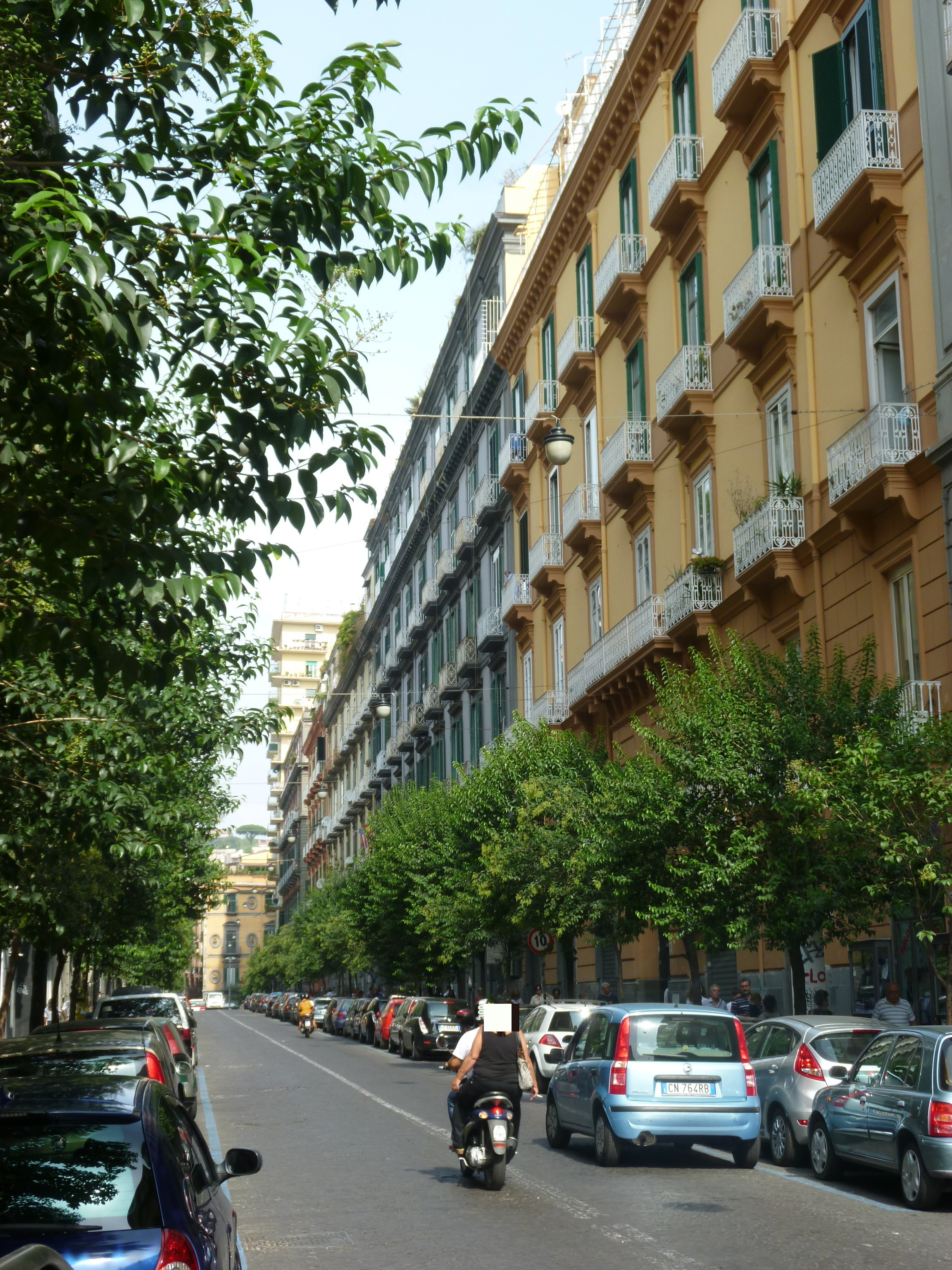 Napoli